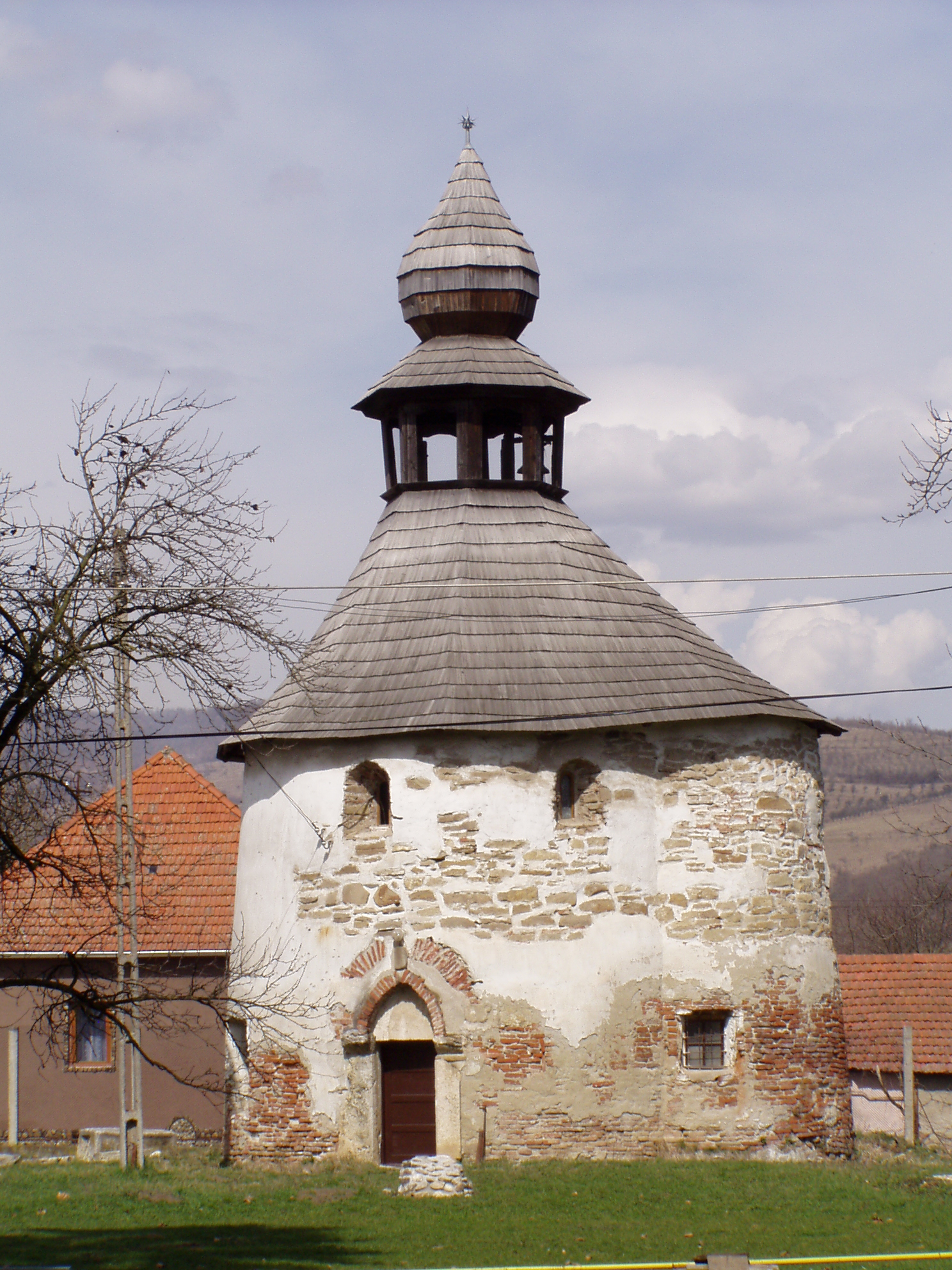 Biserica Reformată-Calvină Rotonda din Geoagiu, judeţul Hunedoara, Transilvania (fotografie din colecţia Marcel Muntean, Orăştie)